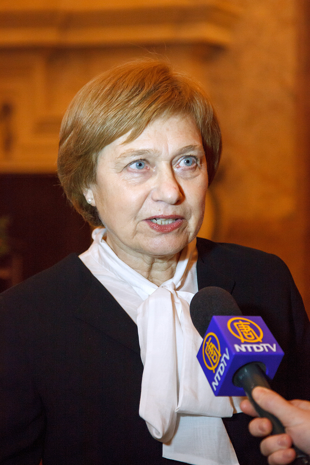 Alena Palečková, místopředsedkyně Senátu PČR při rozhovoru pro televizi NTD. (Kamil Rakyta/Velká Epocha)